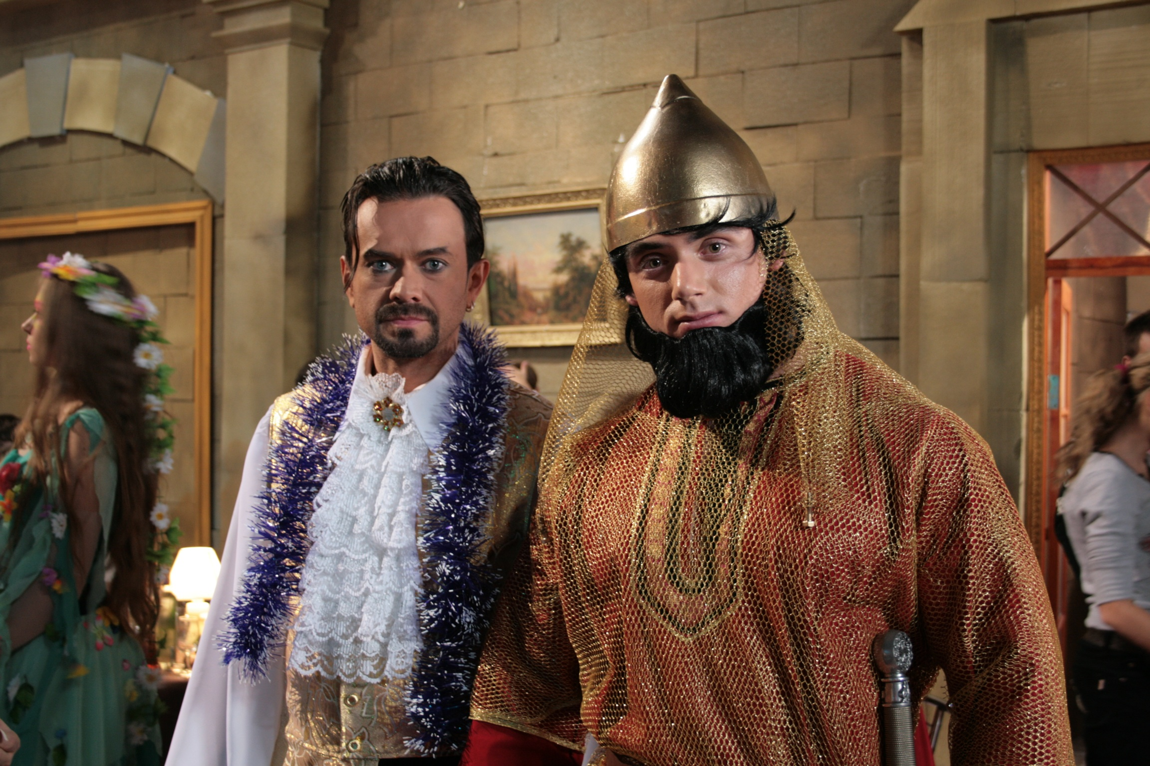 Волотовский Юрий на сьемках Новогоднего огонька